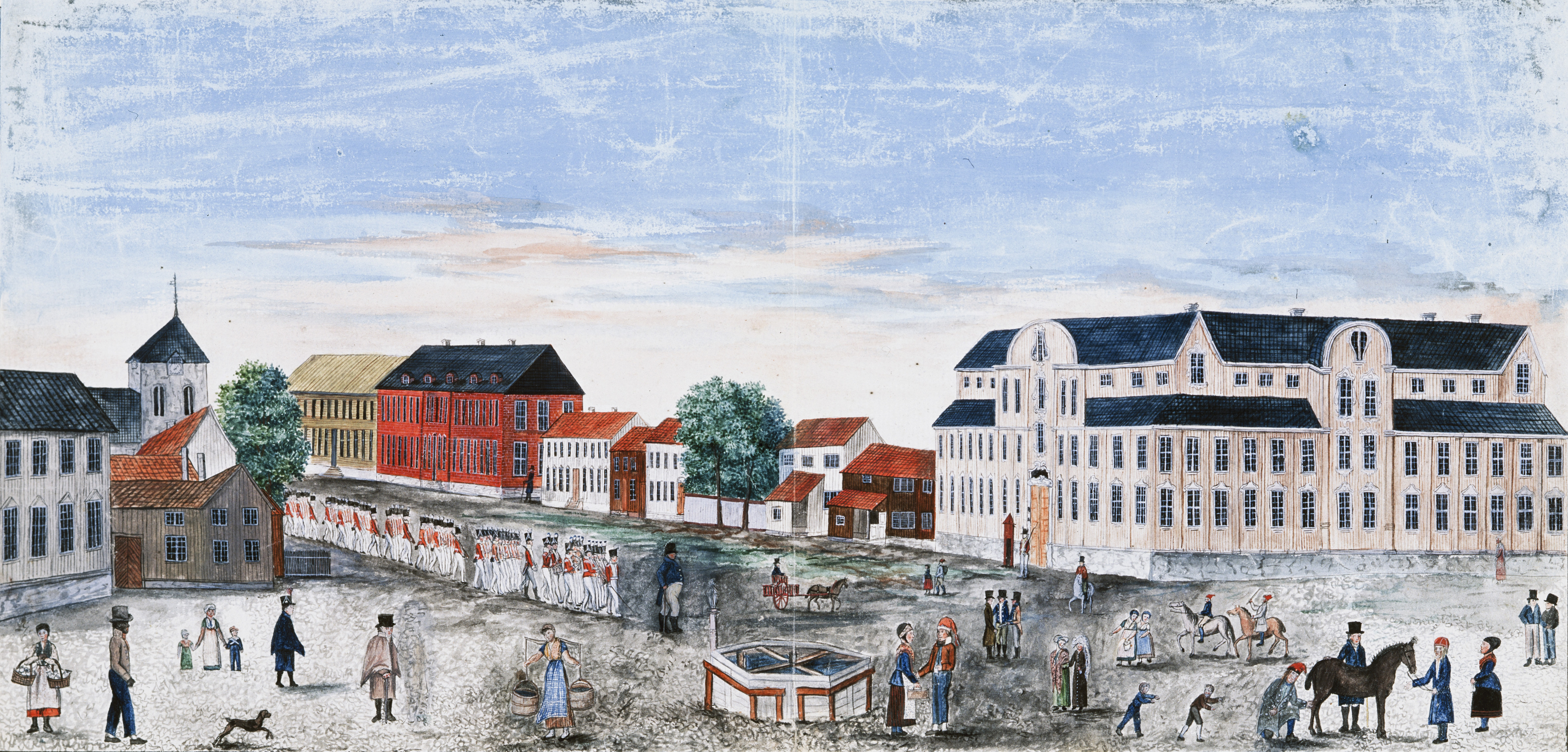 Tekst fra gunnerus.no: "Avfotografert akvarell malt av Christense Henriette Geelmuyden som viser Torvet, krysset Munkegata/Kongens gate. Til høyre troner Harmonien, Munkegata 22. og til venstre ser vi Hornemannsgården, Kongens gate 1. Mellom den og Munkegata 21 går Presidentveita ned. Vi ser husrekka oppover Munkegatas venstre side opp mot Nidarosdomen som vi ser på enden av gaten. På bildet ser vi soldater som marsjerer, hest og kjerre, folkeliv, vannpost." Henriette Geelmuyden var født i 1790 og døde i 1832.